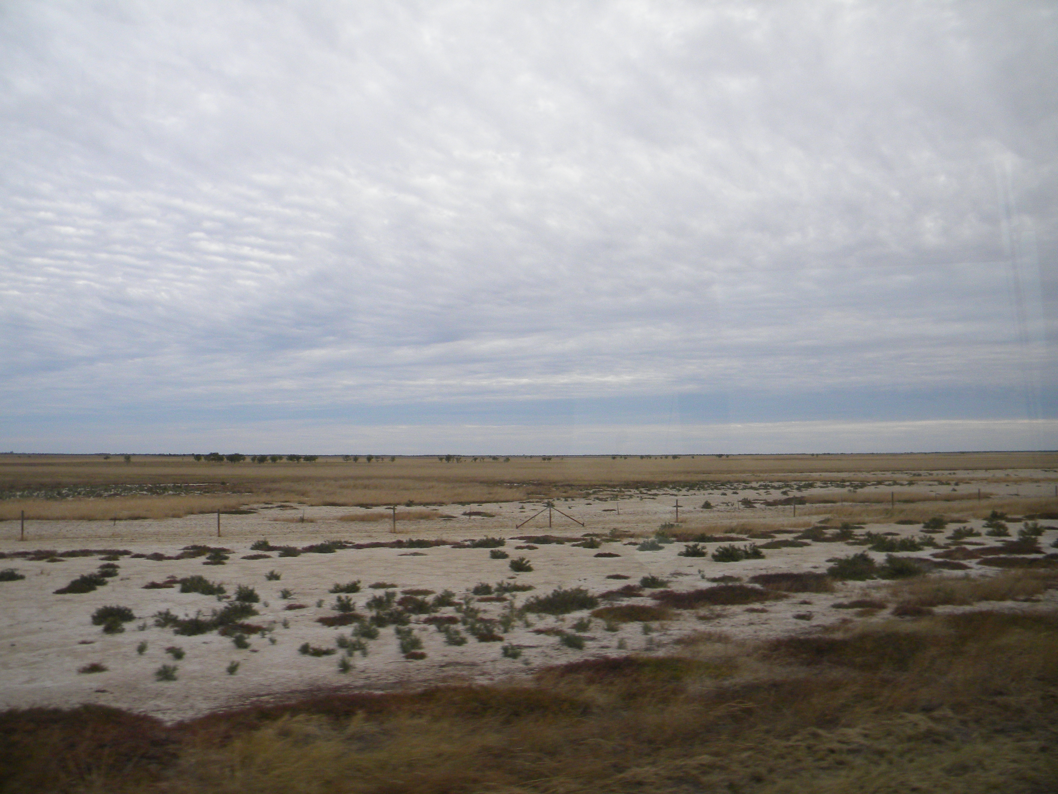 Burke Development Road